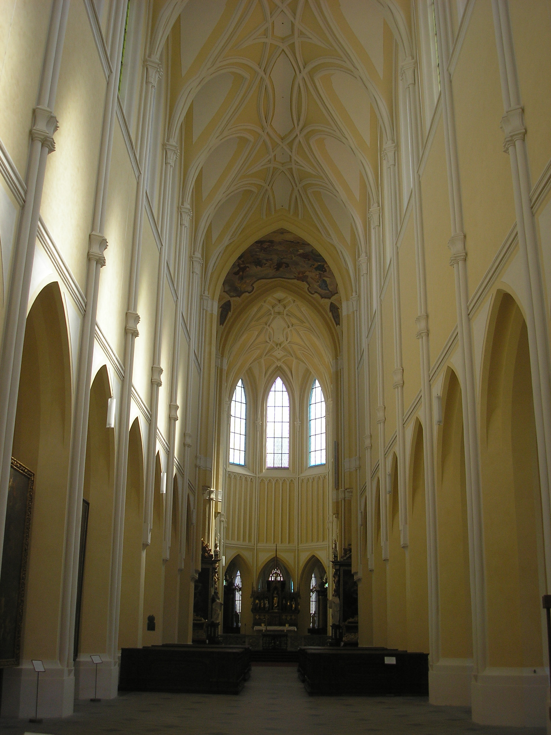 Innenraum des Kloster Sedletz